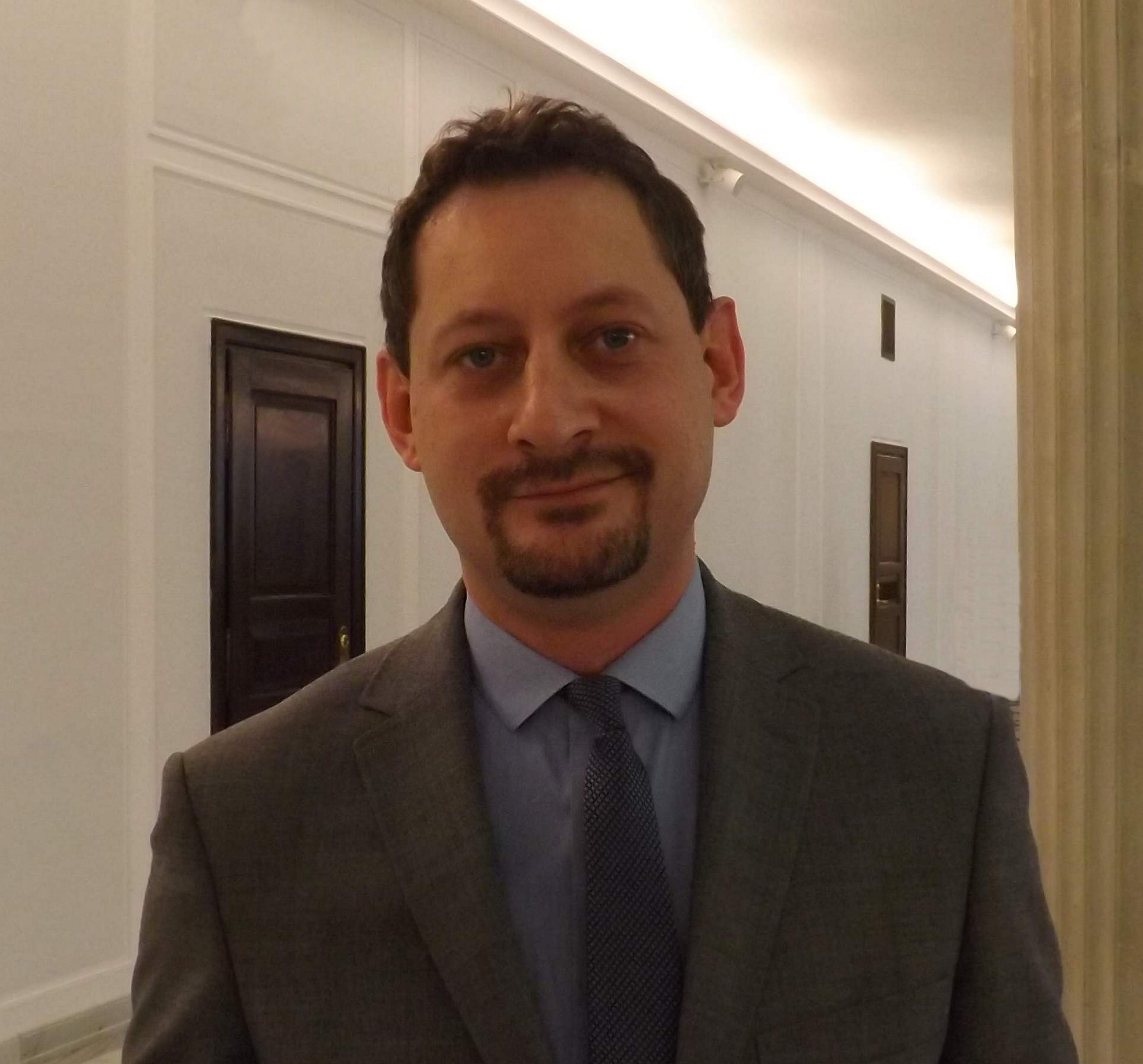 Armand Ryfiński, poseł Twojego Ruchu.